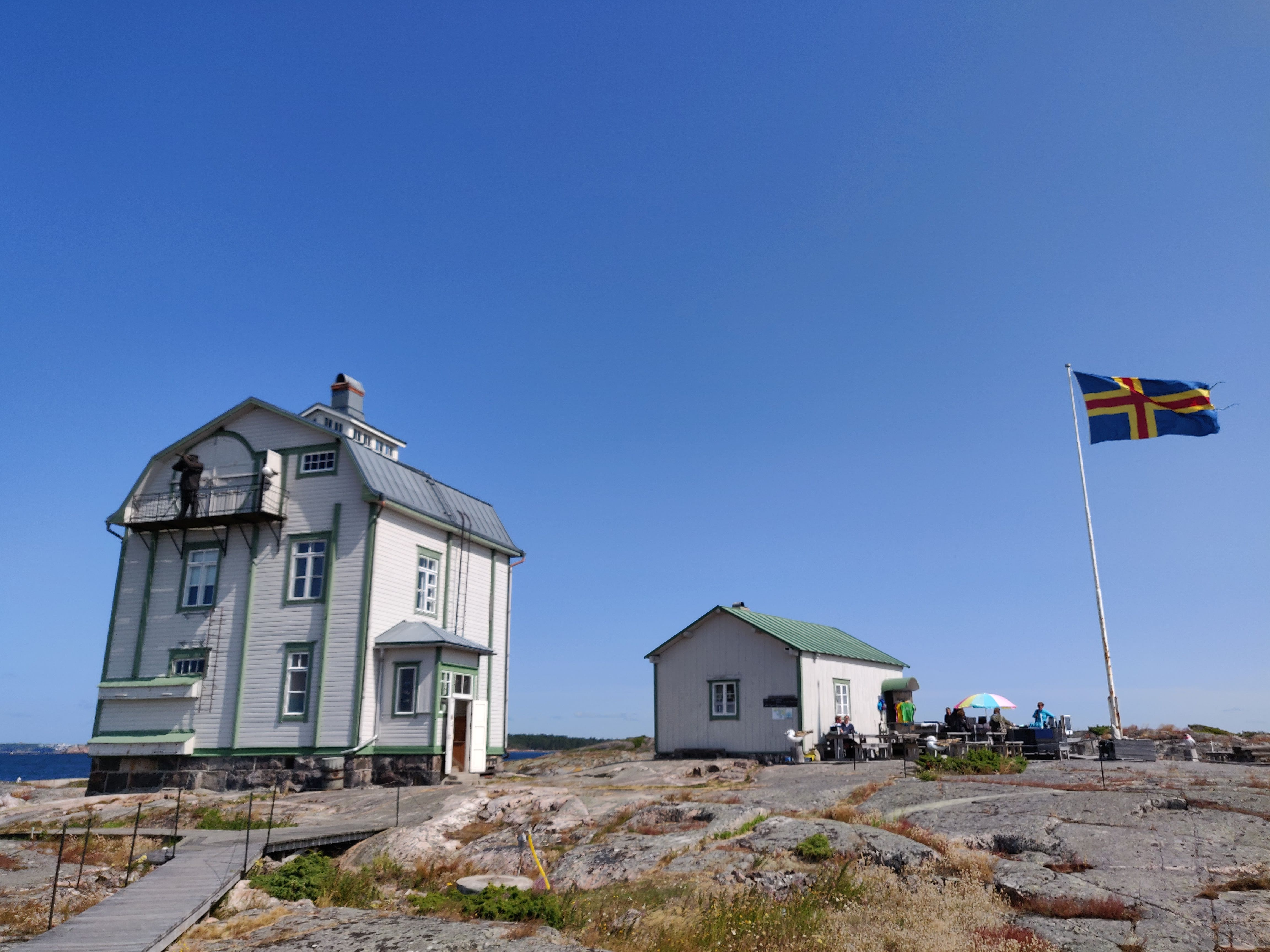 Die Flagge Ålands weht vor dem Haupthaus und Café auf Kobba Klintar.